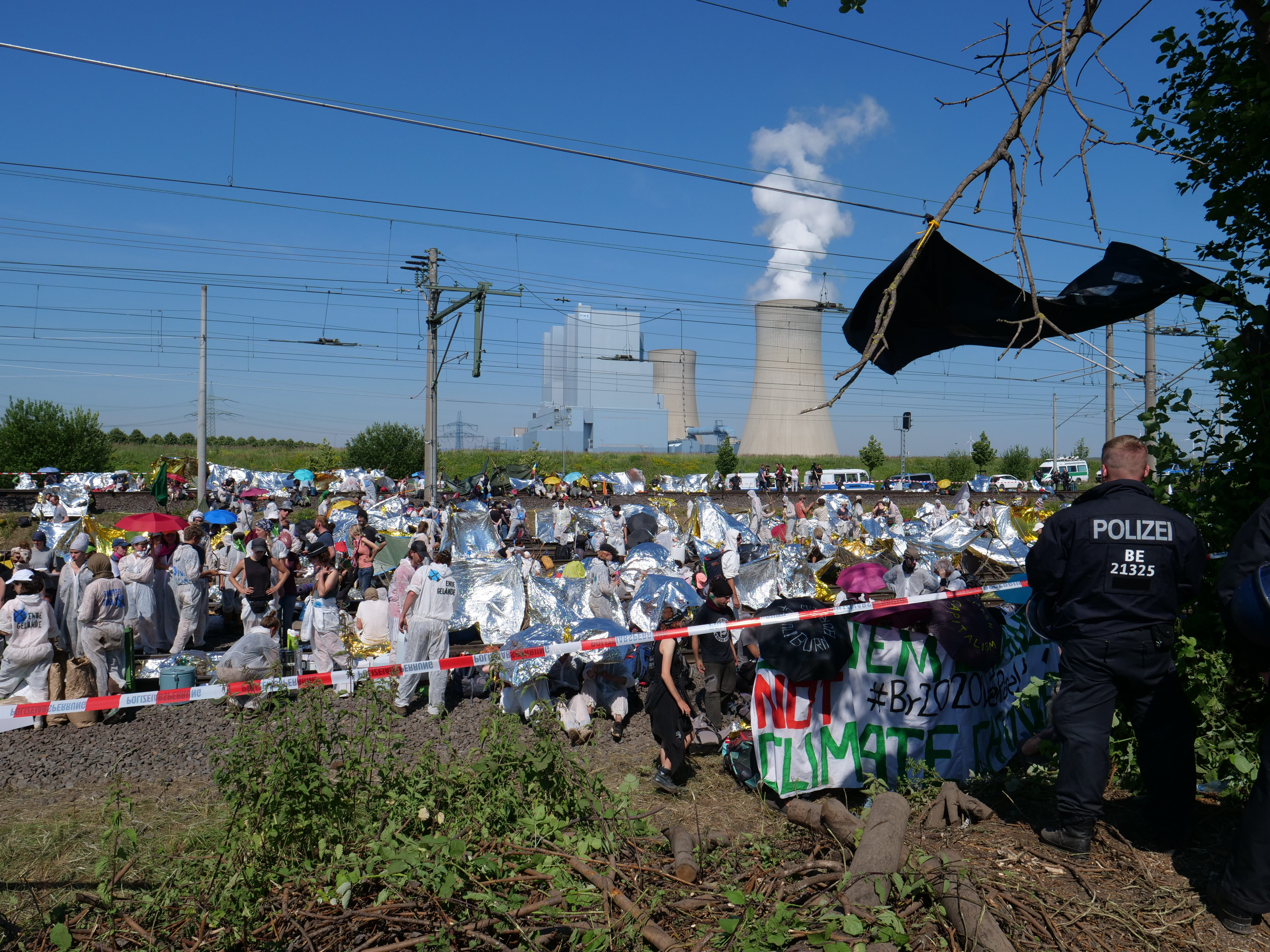 Blockade der Nord-Süd-Bahn durch Ende Gelände am Kraftwerk Neurath am 23. Juni 2019.